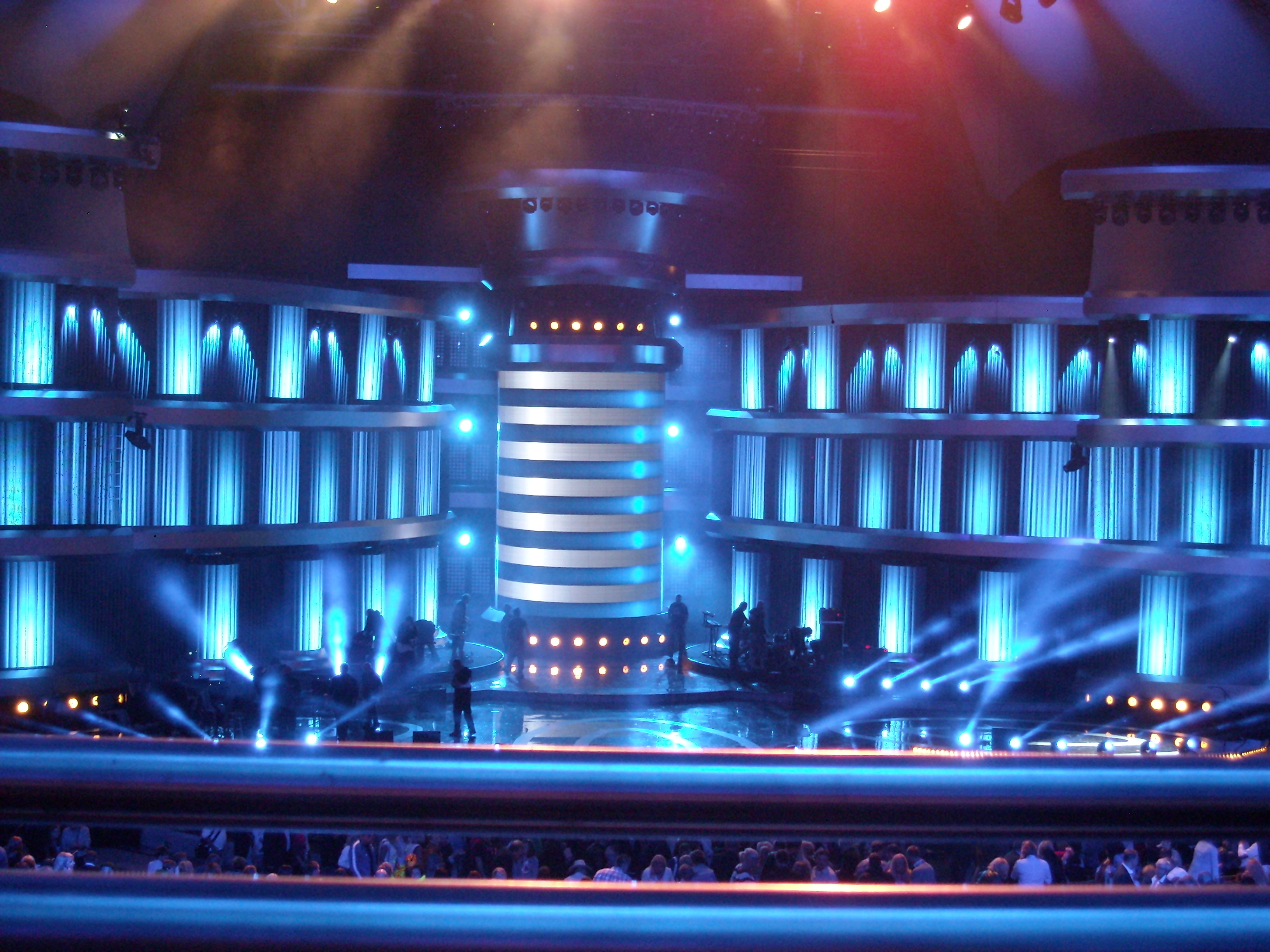 Scena Sopot TOP OF THE TOP Festiwal 2013